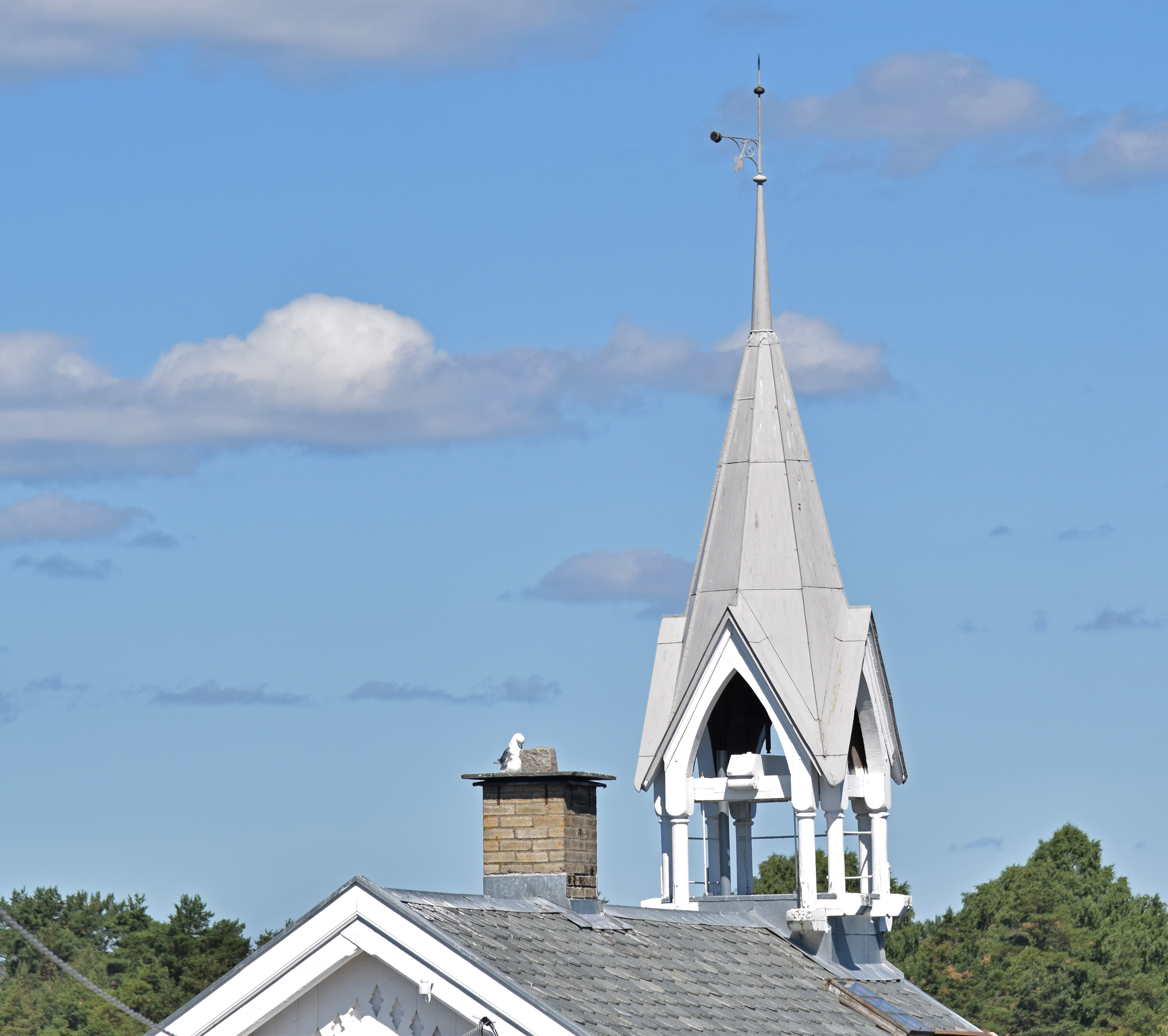 Tårnet på Heggholmen fyr. Tåkeklokken ble fjernet en gang på 1900-tallet.